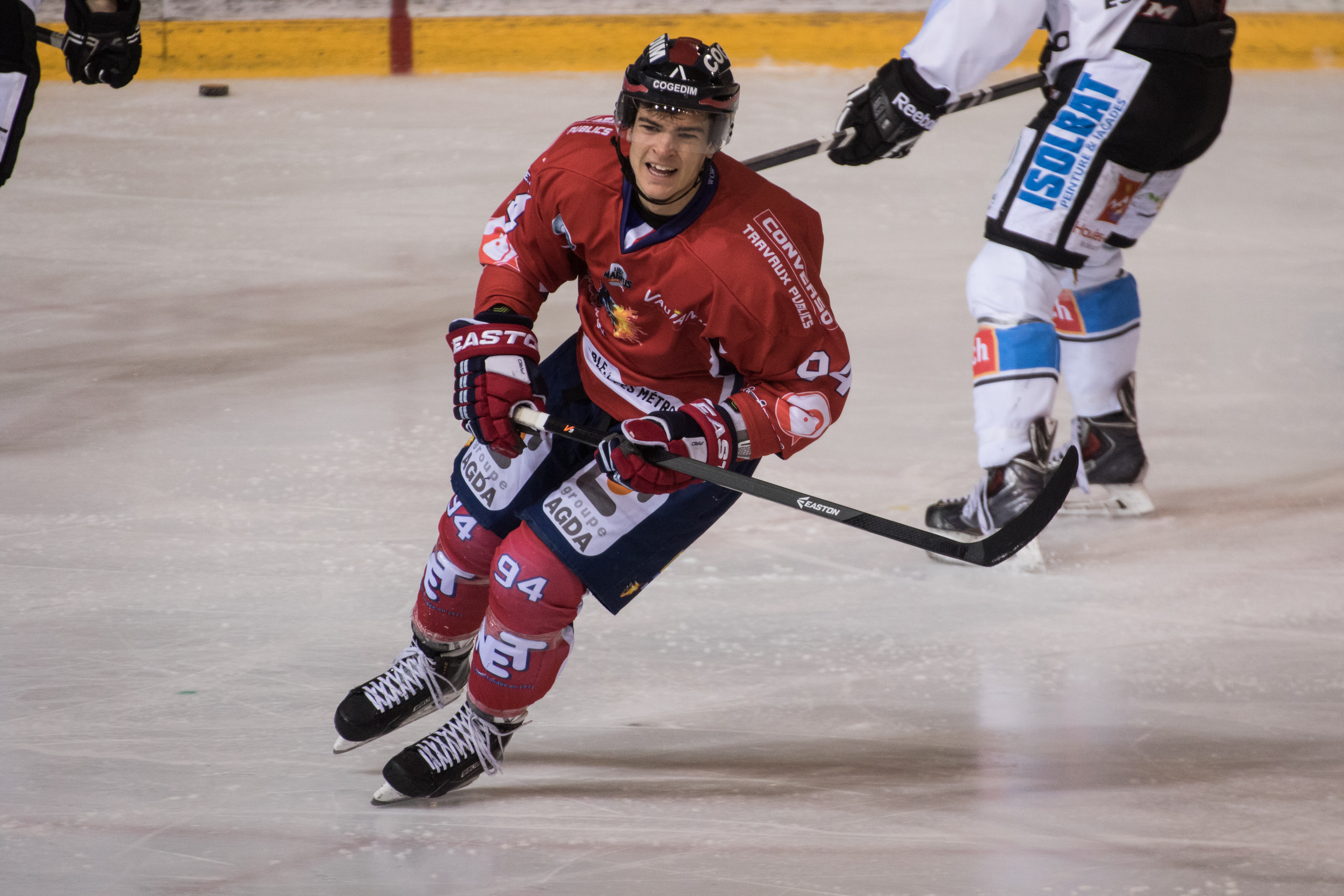 Jordann Perret, lors du match de la Coupe de France de hockey sur glace contre Gap, le 9 décembre 2014 à Grenoble.